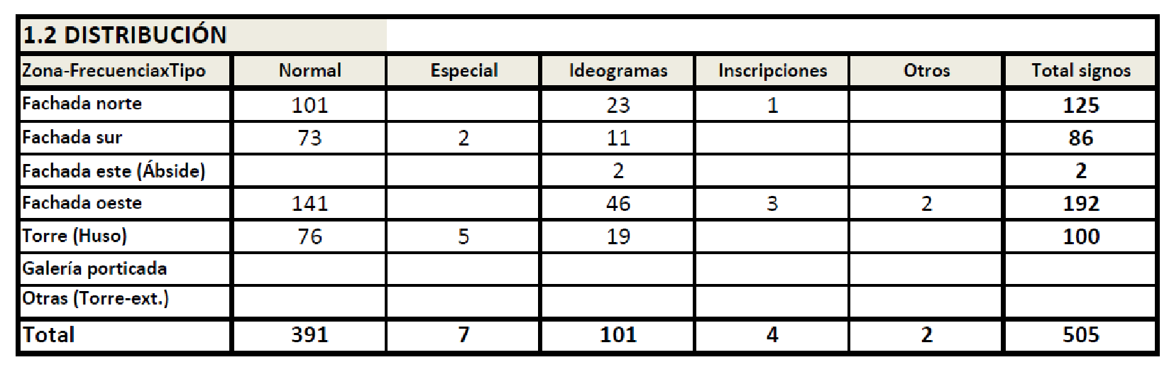 Carracedo del Monasterio (León) España. Igl. de Sta. María s XII-XIII. Distribución de Signos lapidarios.